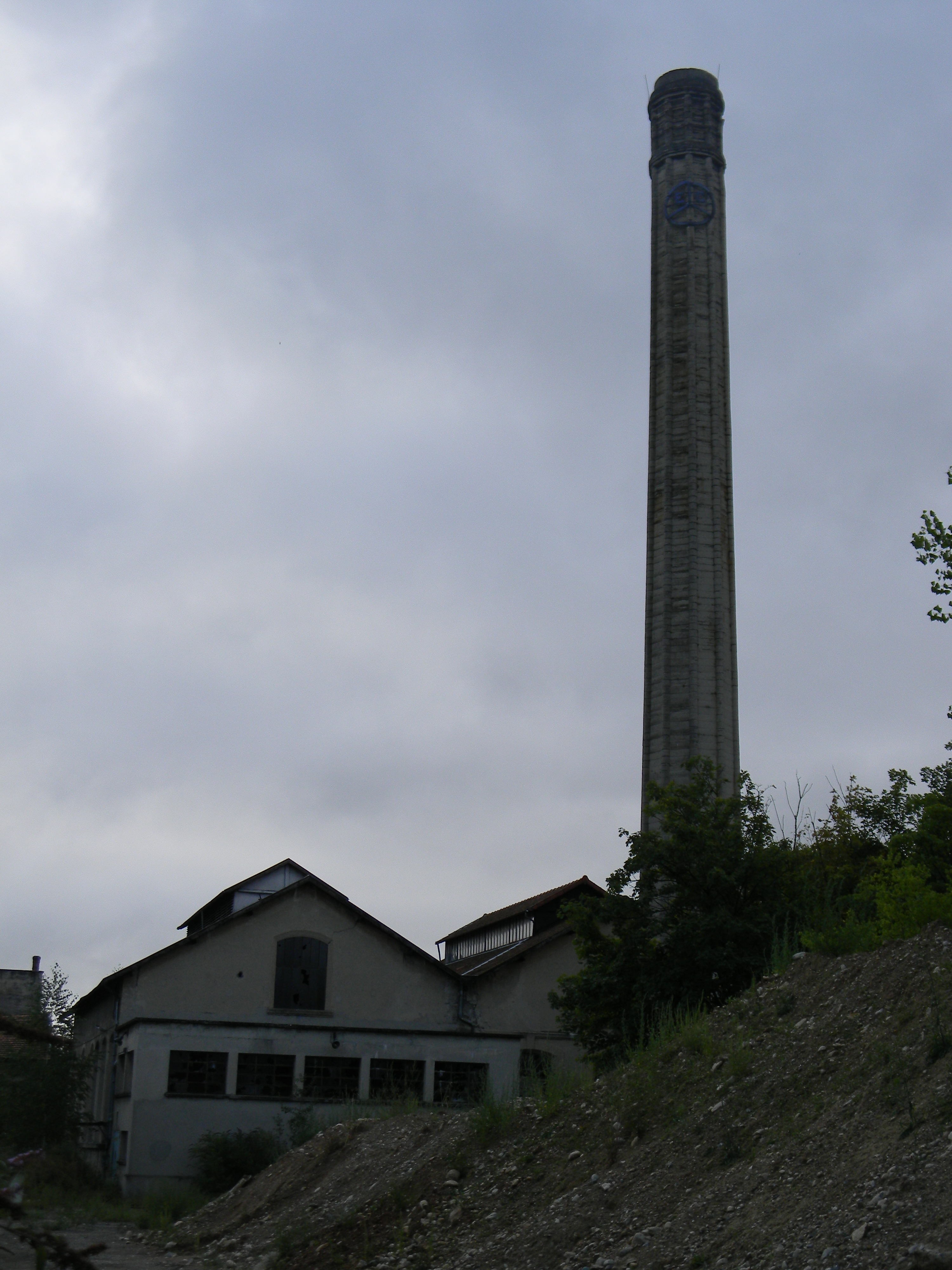 Un bâtiment et une cheminée de l'usine Grammont de Charvieu/Pont-de-Chéruy.